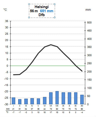 Helsingi kliimadiagramm